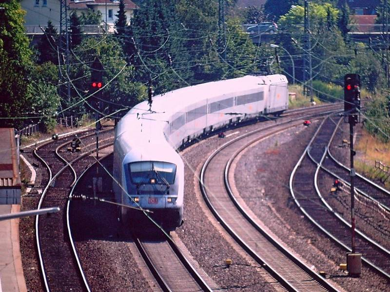 Der silberfarbene Hochgeschwindigkeitszug Metropolitan im Bahnhof Buchholz (Nordheide) von der Güterstrecke aus Maschen kommend.